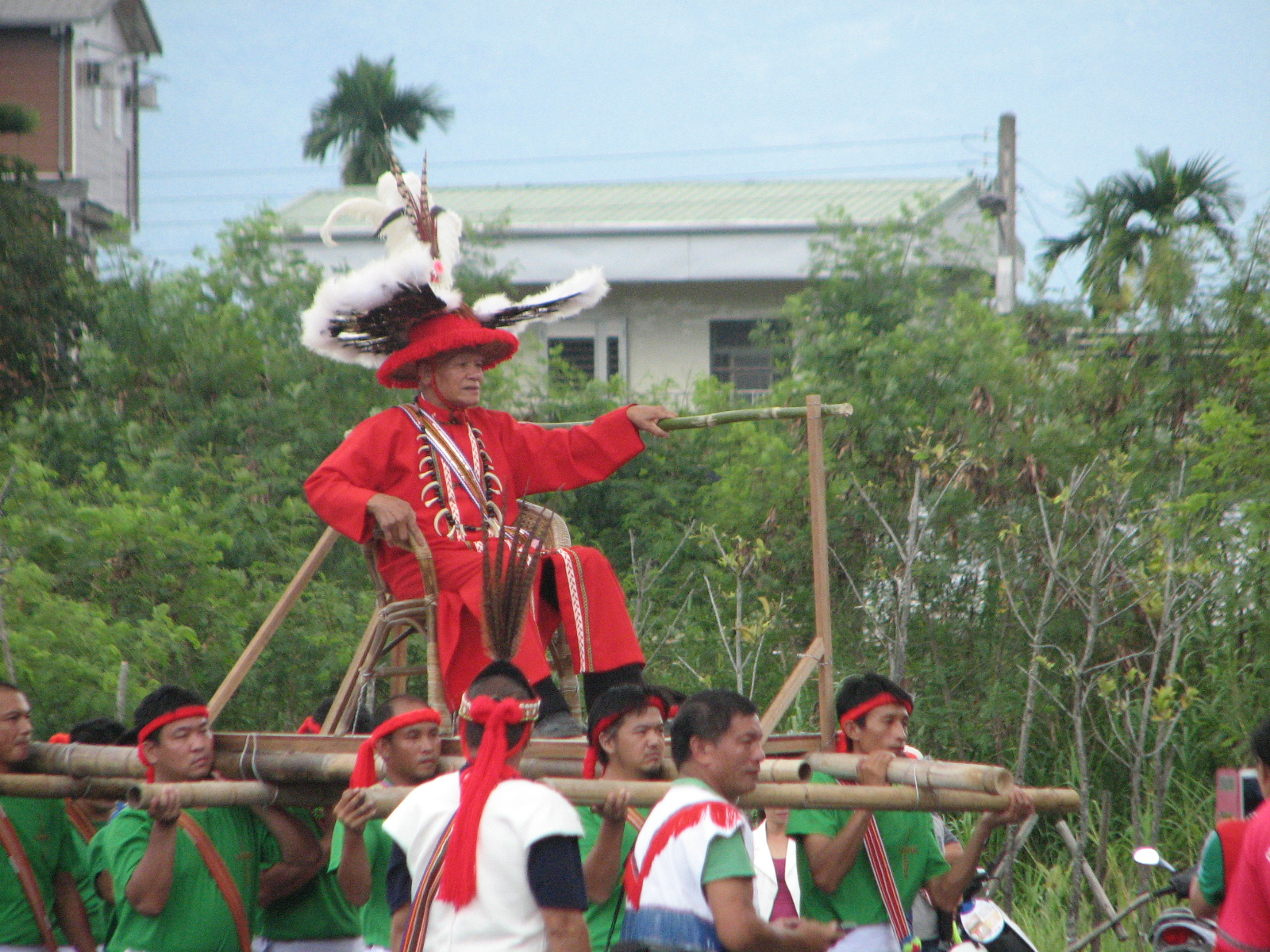 頭目由部落拉達富階層扛轎進場